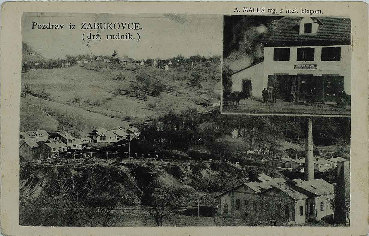 Razglednica Zabukovice.